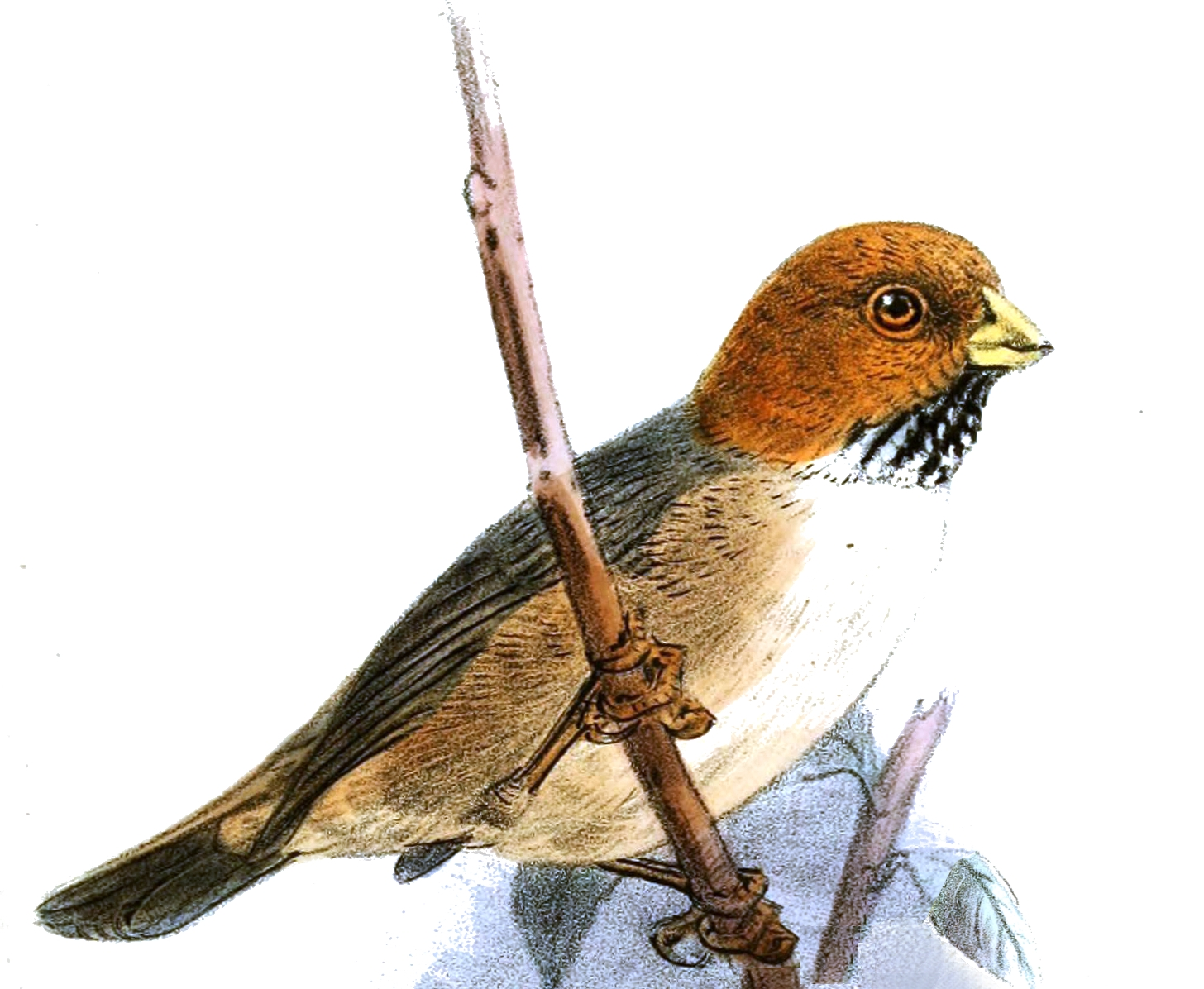 Suthora davidiana = Neosuthora davidiana / Paradoxornis davidianus